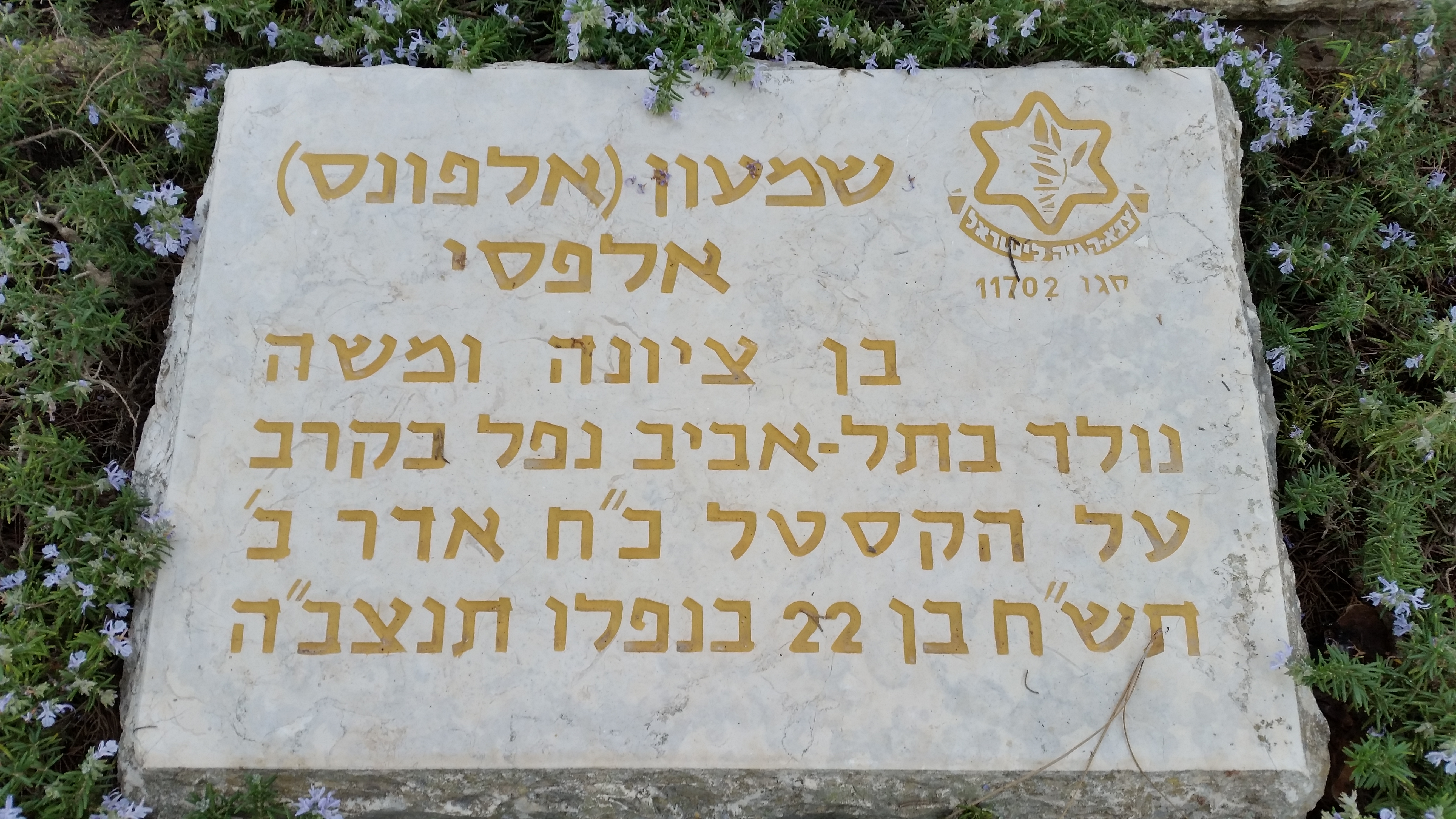 קברו של שמעון אלפסי, המפקד שנהרג בקרב על הקסטל